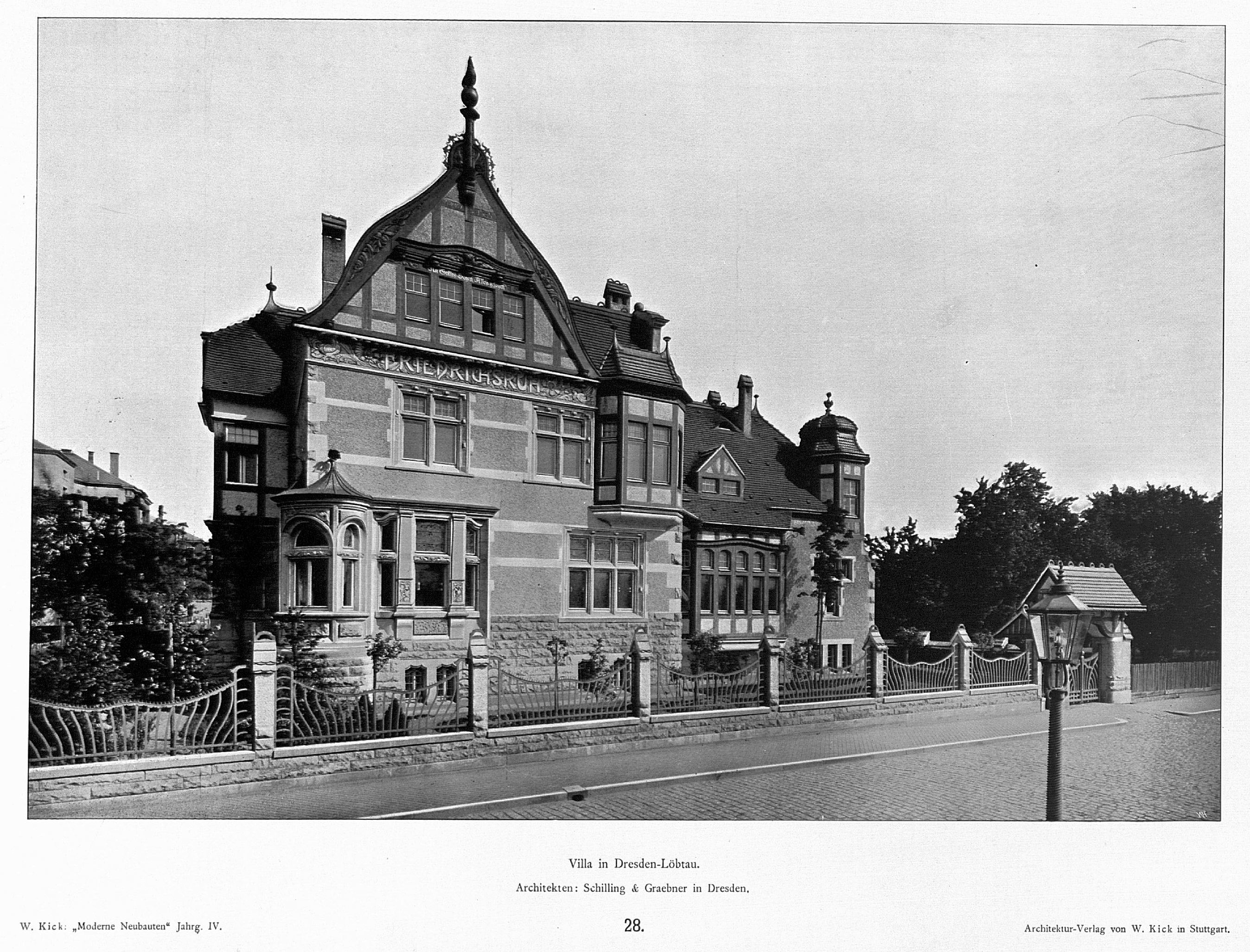 Villa „Friedrichsruh“ in Dresden-Löbtau, Hermsdorfer Straße 16; erbaut 1898 nach Entwurf der Dresdner Architekten Rudolf Schilling und Julius Wilhelm Graebner; unter Denkmalschutz